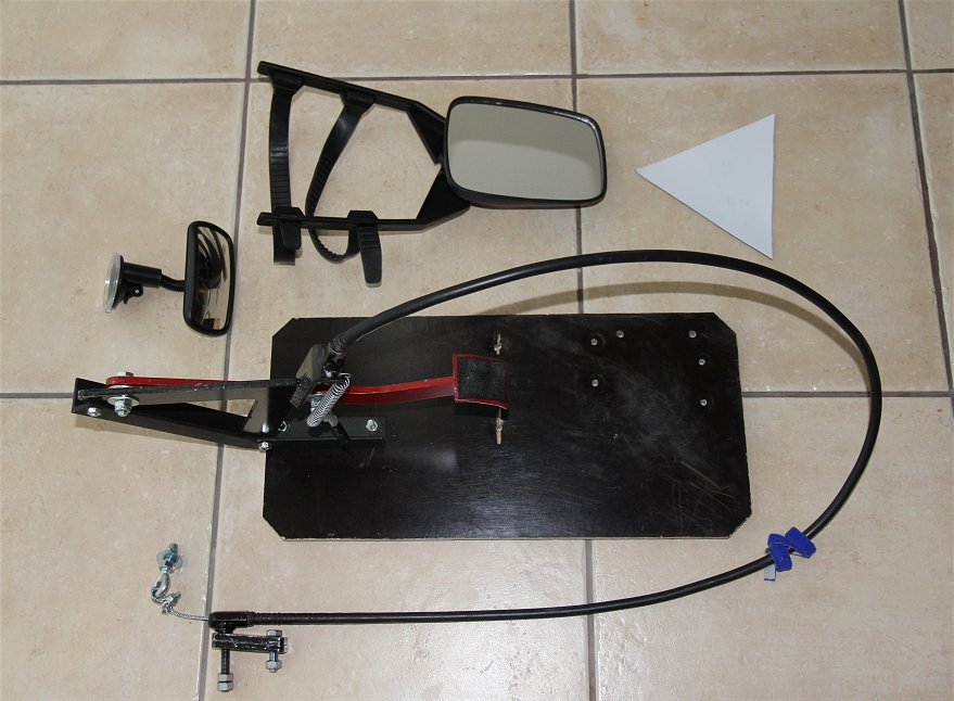 Opetusluvalla toteutetussa opetuksessa käytettyä varustusta. Opetuspoljin, kolmio (magneetti) ja sivupeili, sekä ylimääräinen taustapeili. Huom: Muista säilyttää viittaus kuvaajaan, mikäli käytät kuvaa.